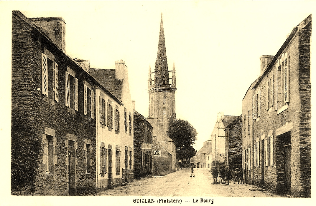 Guiclan au début du XXe siècle (carte postale).